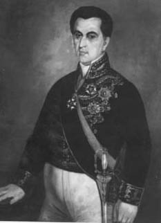 Obra da coleção Brasiliana Iconográfica.